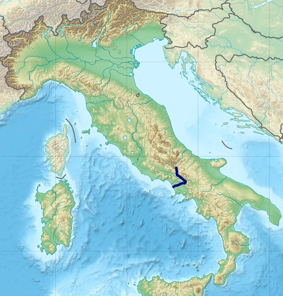 תוואי נהר באיטליה. מקור: File:Italy relief location map-blank.jpg